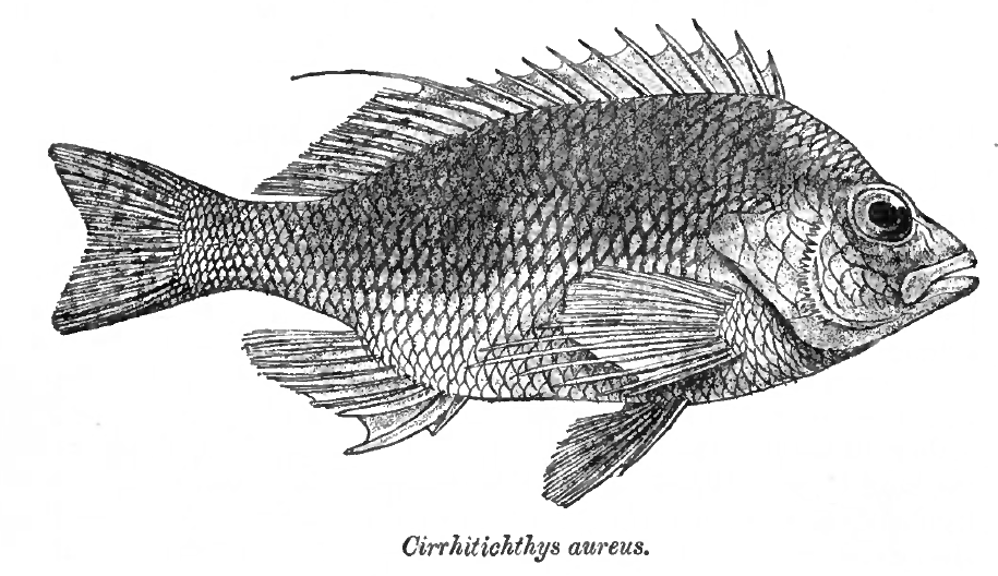 Cirrhitichthys aureus (Temminck & Schlegel, 1842)